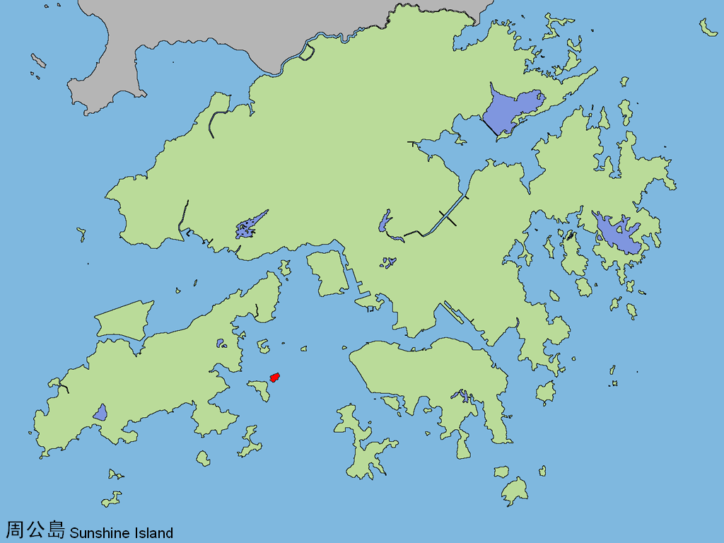 中文（香港）: 周公島。